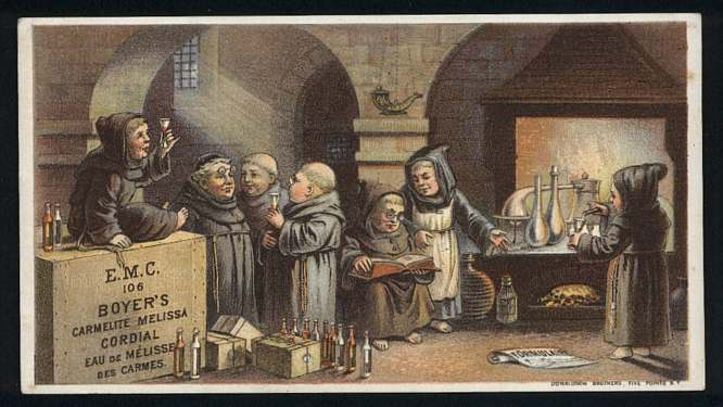 Chromo carmes Boyer face A